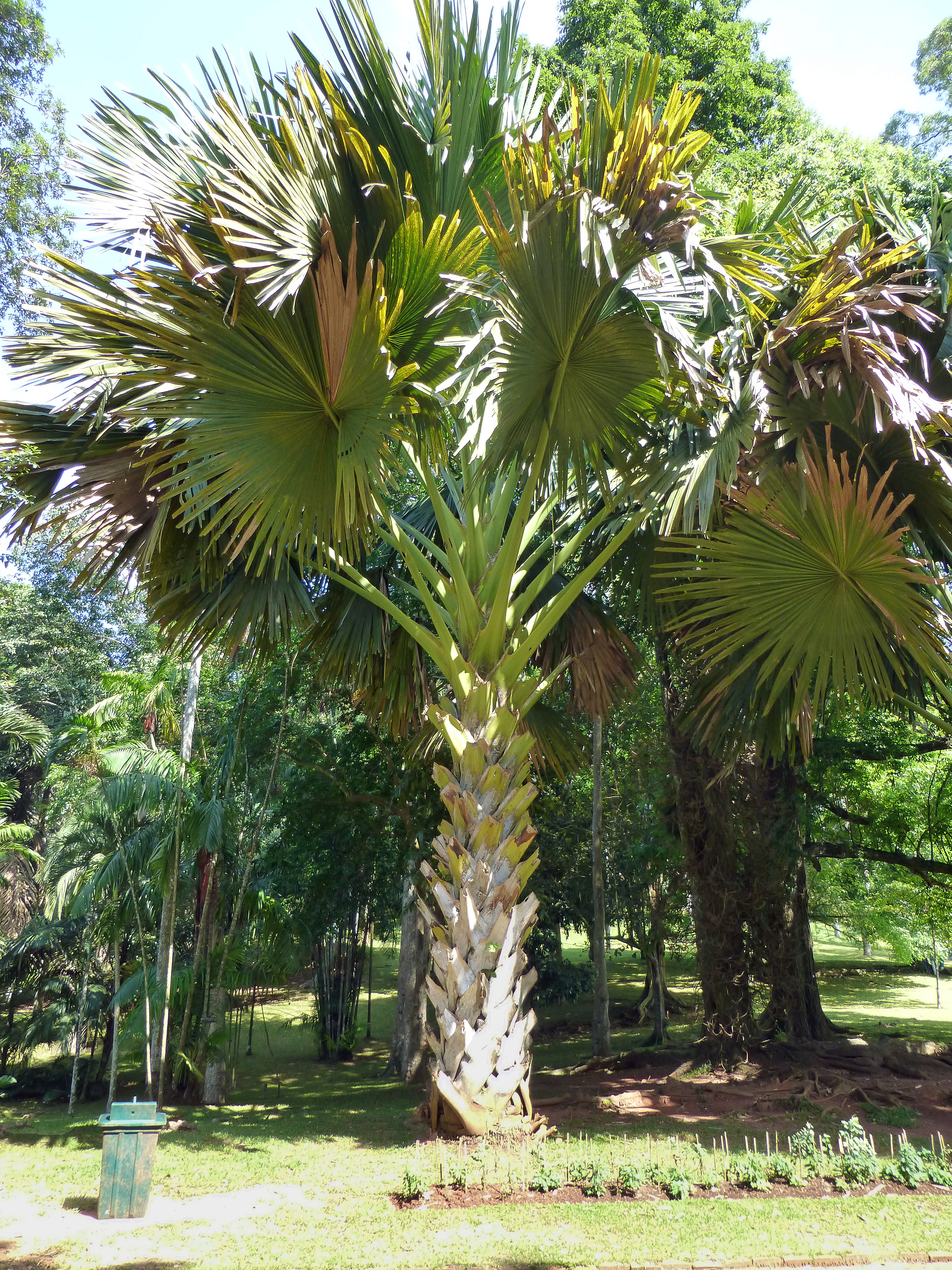 Talipot palm (Corypha umbraculifera) au Jardin botanique de Kandy (Sri Lanka). Origine : Sri Lanka, sud de l'Inde